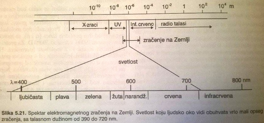 Svetlost koju ljudsko oko vidi obuhvata vrlo mali opseg zračenja, sa talasnom dužinom od 390 do 720 nm.